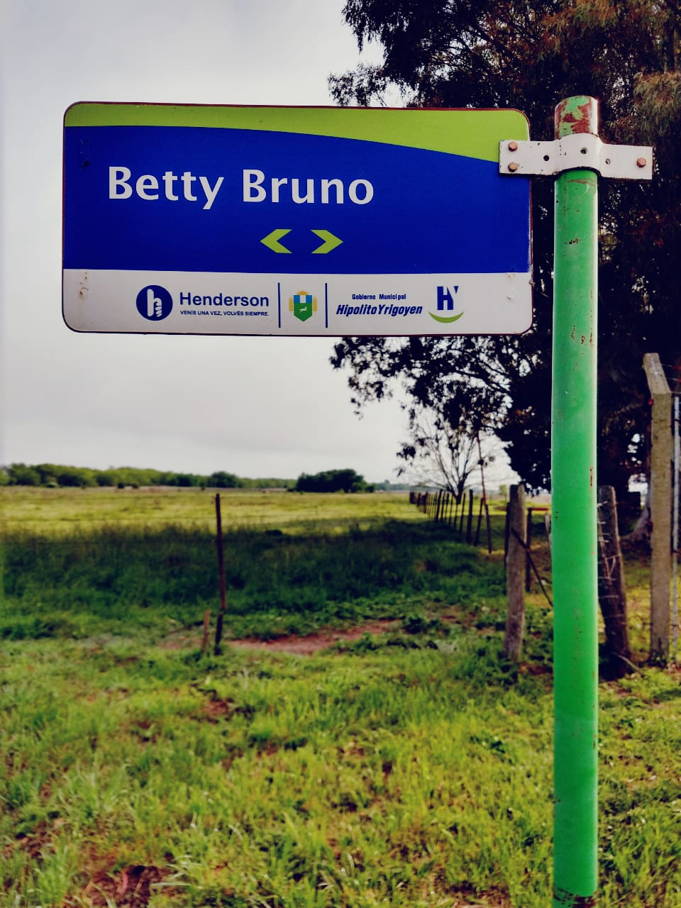 Calle "Betty Bruno"